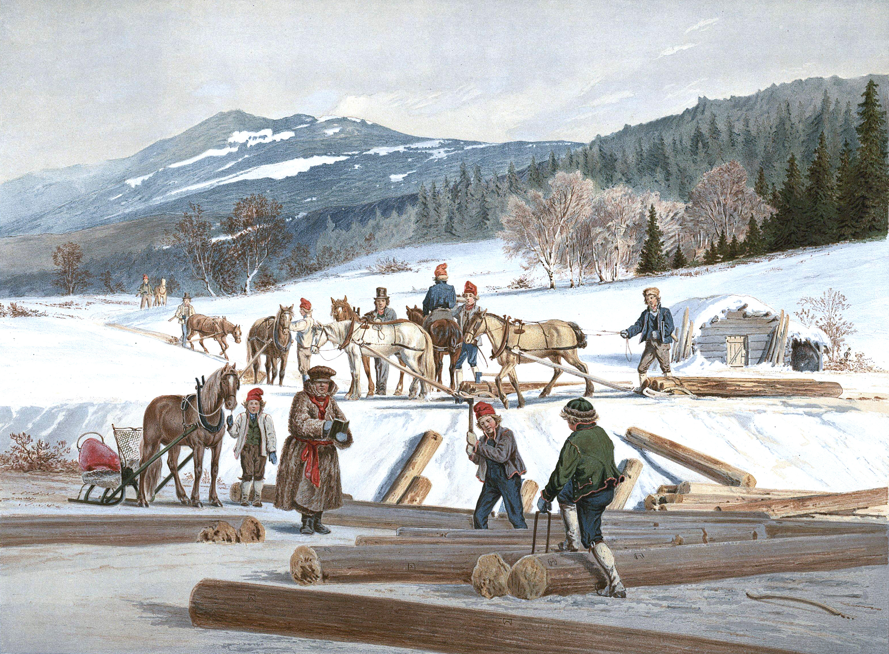 Litografi af Winckelmann & Sönner i Berlin